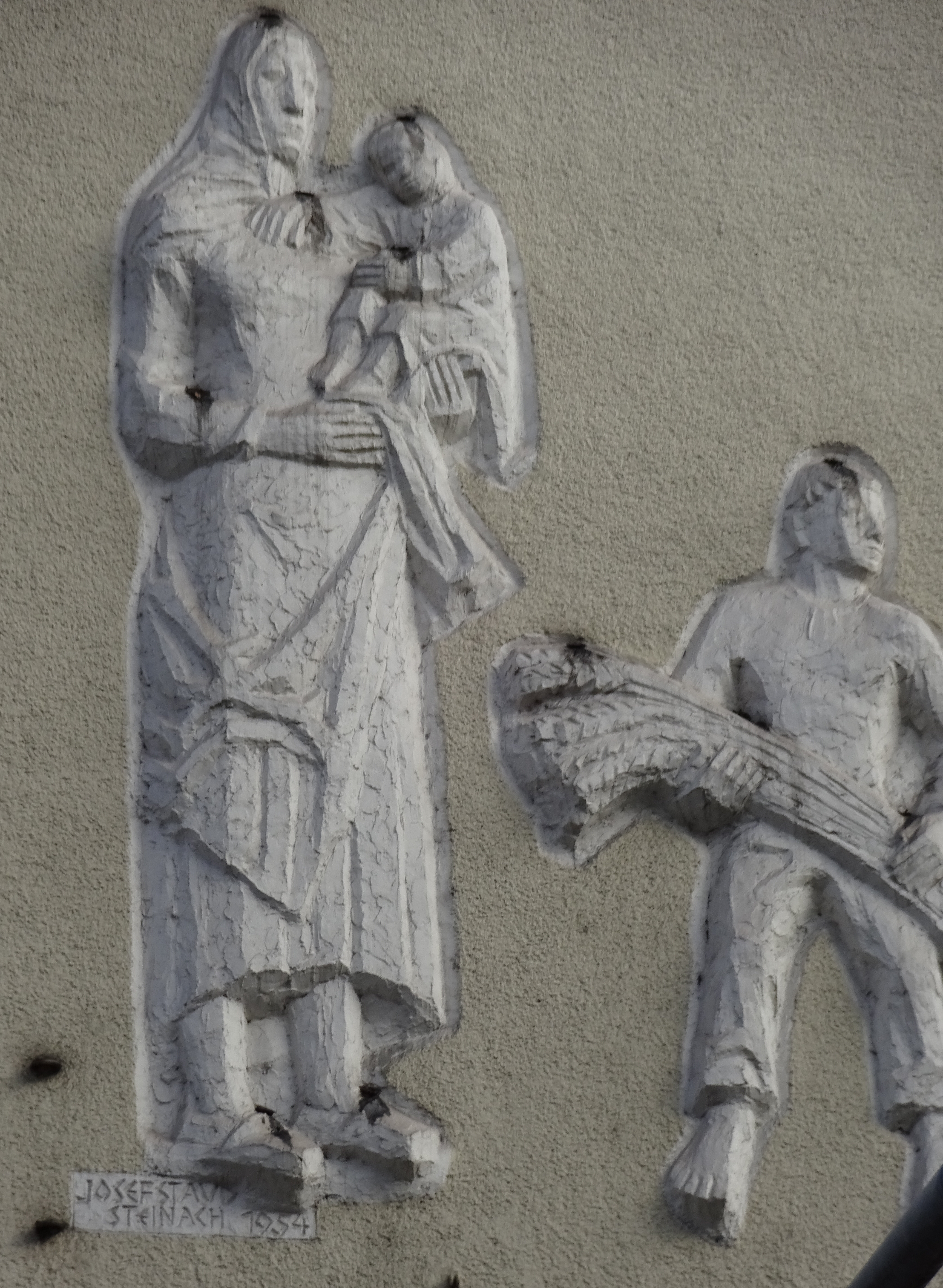 Bauernbundgebäude, Innsbruck: Fassadengestaltung von Josef Staud (1954) This media shows the remarkable cultural object in the Austrian state of Tyrol listed by the Tyrolean Art Cadastre with the ID 120632. (on tirisMaps, pdf, more images on Commons, Wikidata)